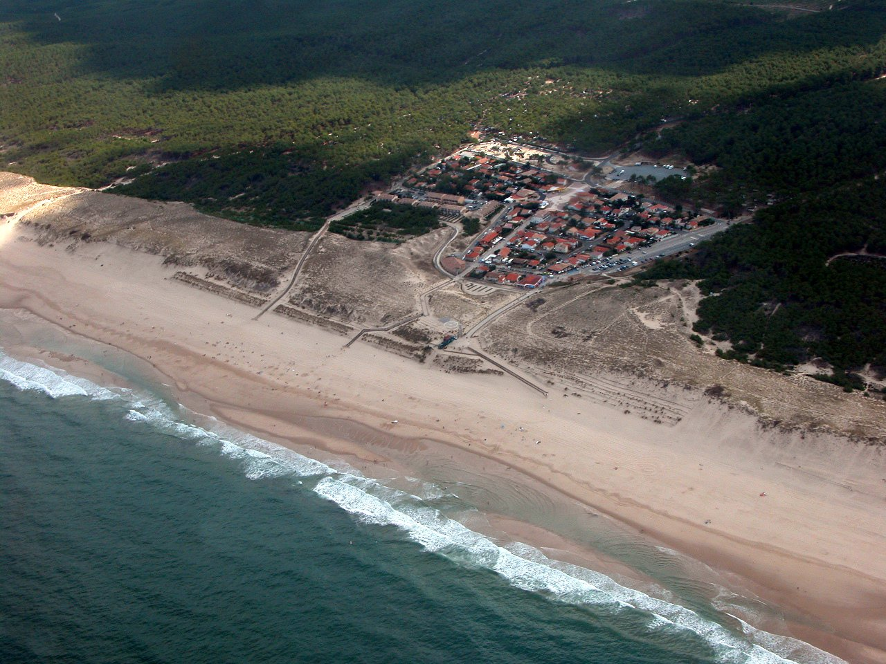 vue aérienne de Carcans-plage, été 2005